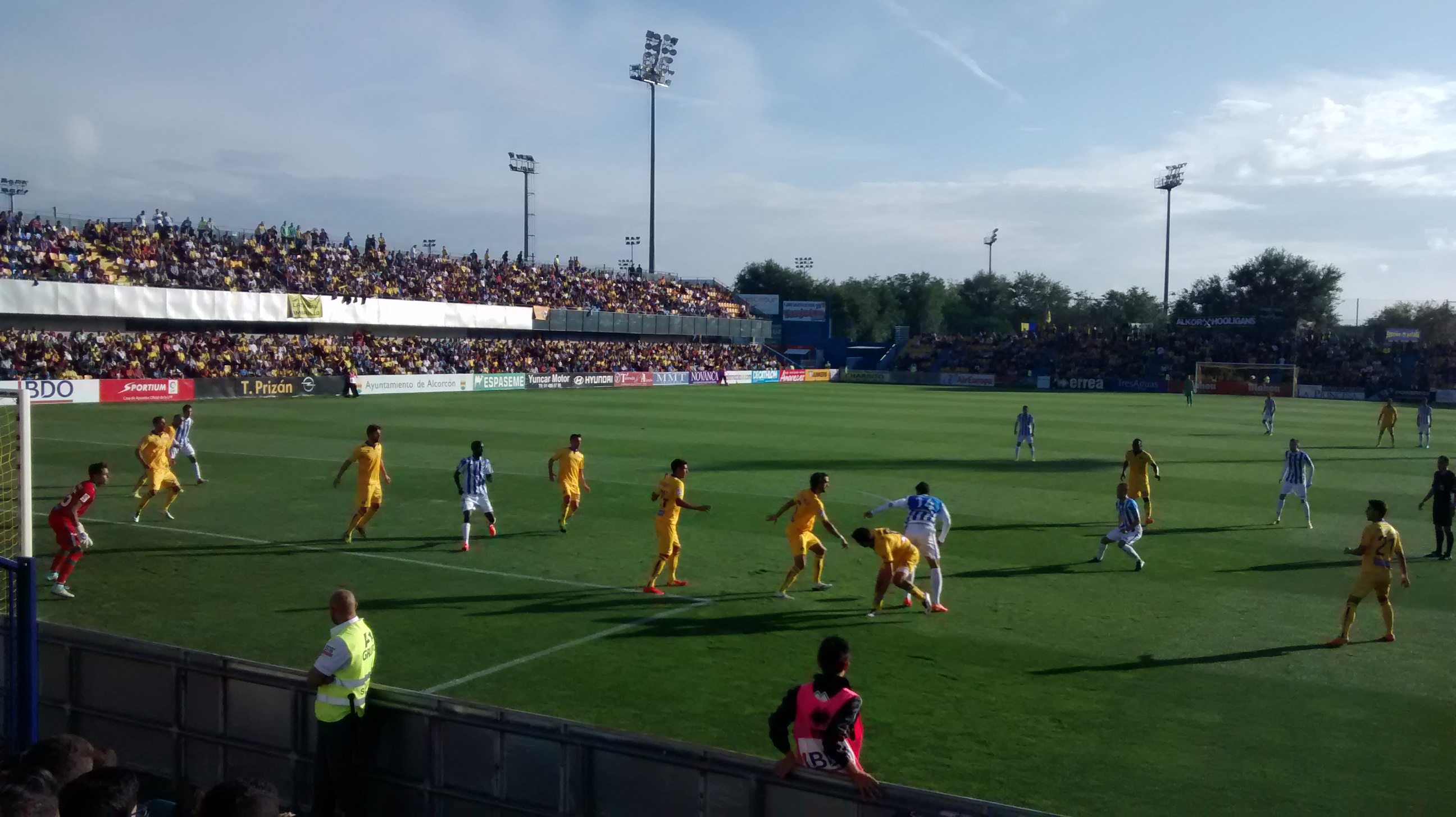 Alcorcón 1-0 CD Leganés, jornada 6 de la temporada 2014/15 de segunda División